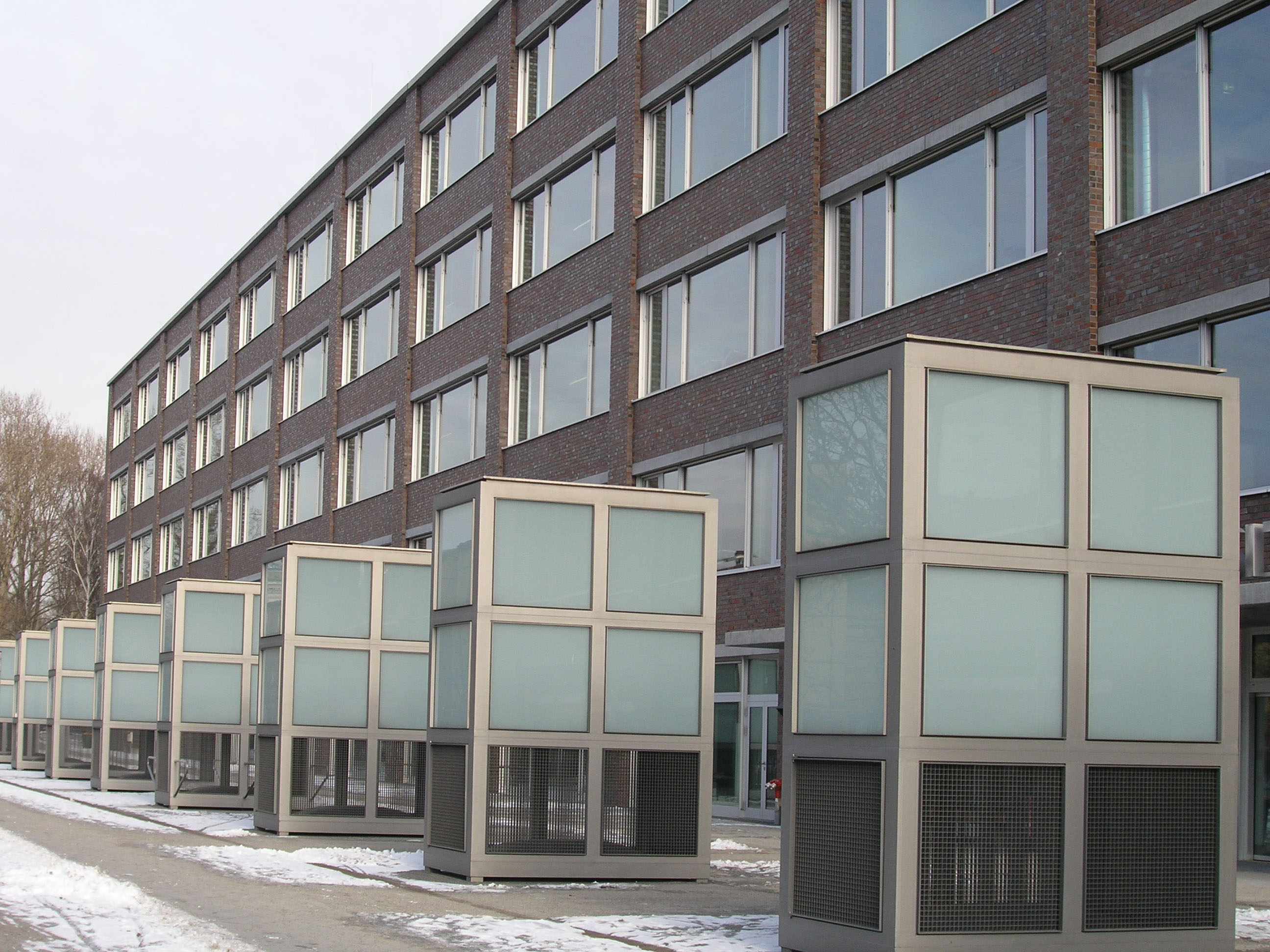 Volkswagenhaus